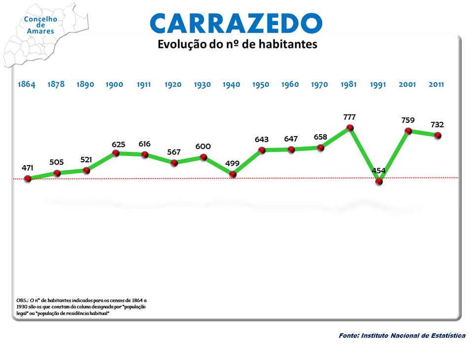 Censo 2011